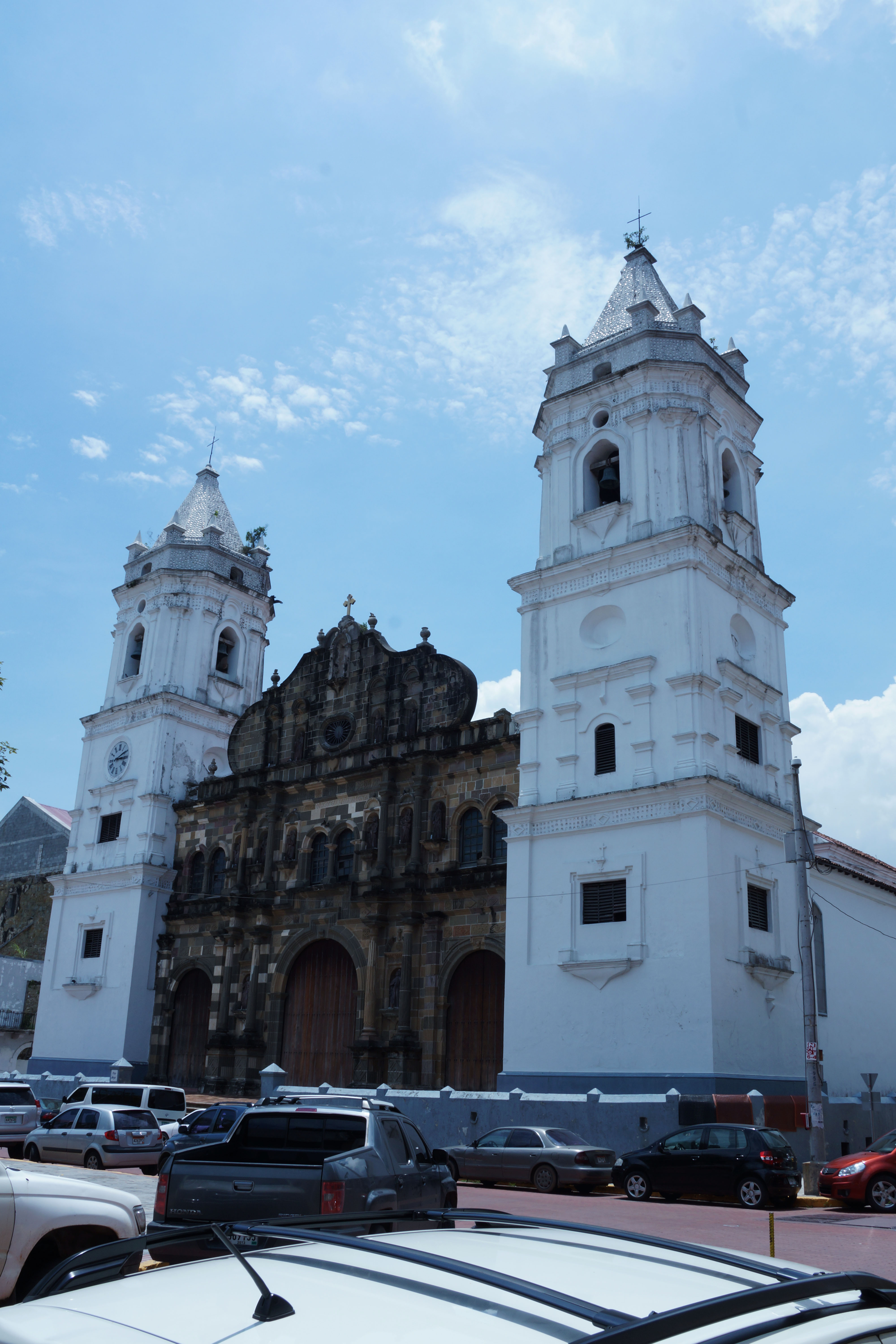 Esta majestuosa obra, fue construida entre los años de 1688 y 1796, es considerada el mejor templo que la arquitectura religiosa de la época dejara en Panamá. Su fachada muestra un equilibrio entre sus torres y la marcada horizontalidad de su portada, también el uso reiterado del arco de medio punto, juega lo mismo para los vanos de ingreso a las naves del templo que se duplica para utilizarse en las arcaizantes ventanas parteluz del coro; usándose también en los nichos, donde unas ajustadas esculturas de madera dan el sentido teológico a la portada. En sus altas torres se ubican las campanas trasladadas de la primitiva Catedral de Panamá la Vieja, con el chapitel de remate recubierto de un sinnúmero de conchas marinas, que proporcionan un marcado sabor regional a la catedral. Actualmente, en su espacio interior se visualiza un cuadro de escuela Sevillana, en proceso de restauración.